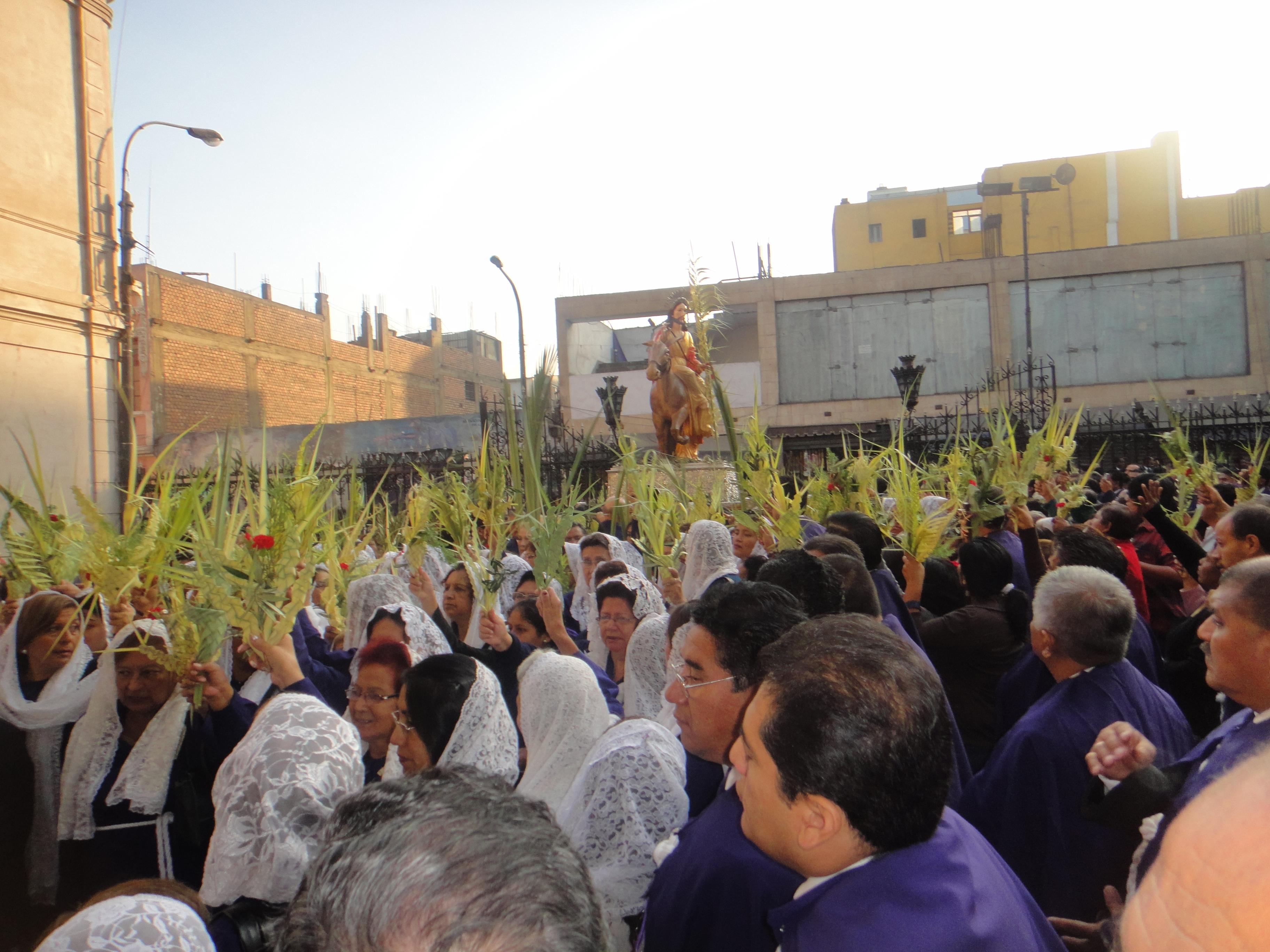 Procesión del Señor del Triunfo del Santuario de Las Nazarenas, Domingo de Ramos Lima-Perú.